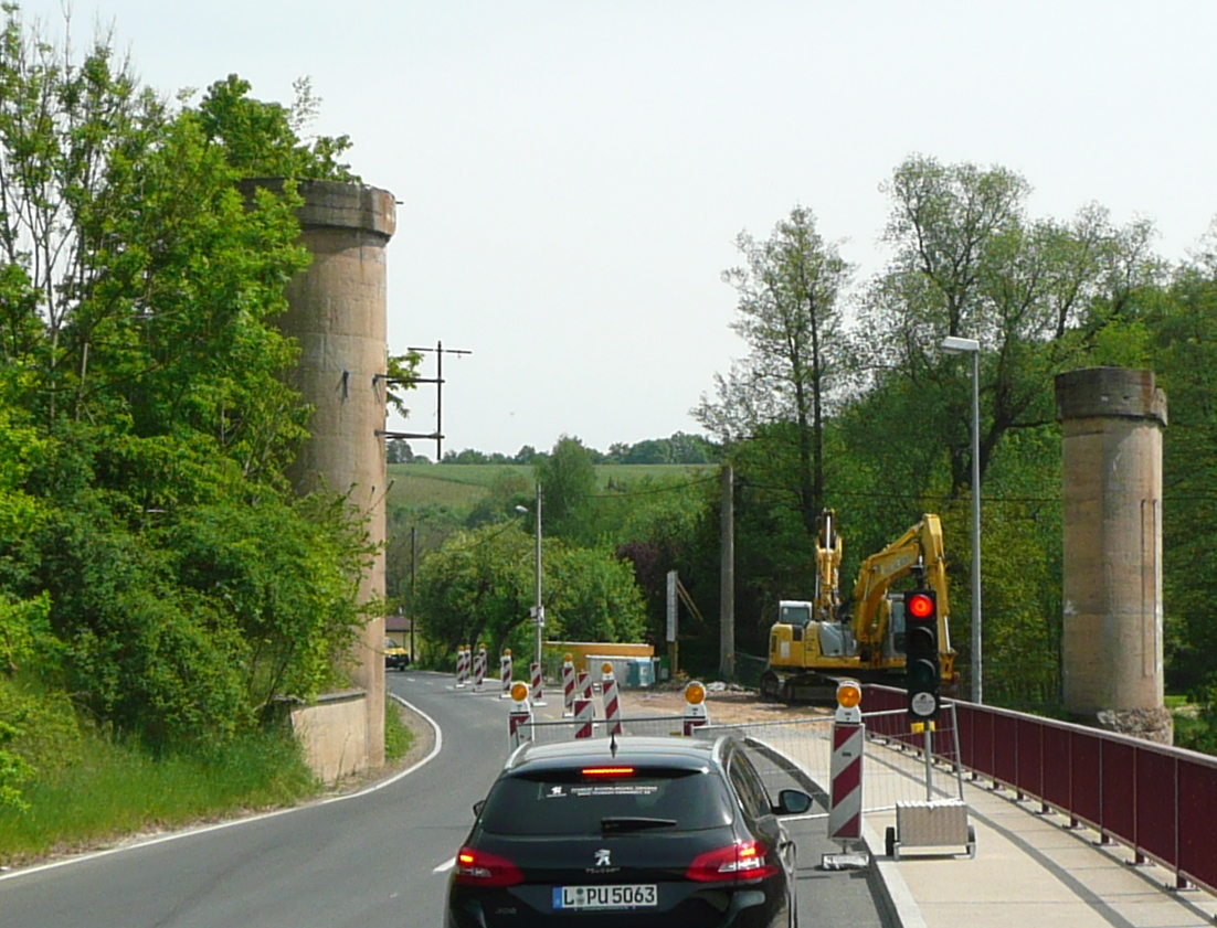 erhaltene Pfeiler des Viaduktes in Garsebach